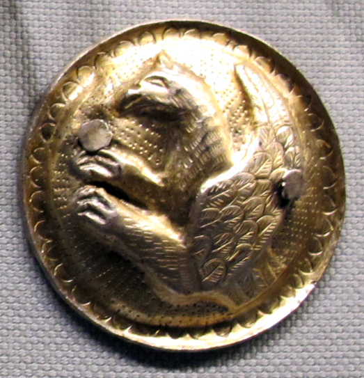 Tesoro di surcea, falera, I sec. ac.